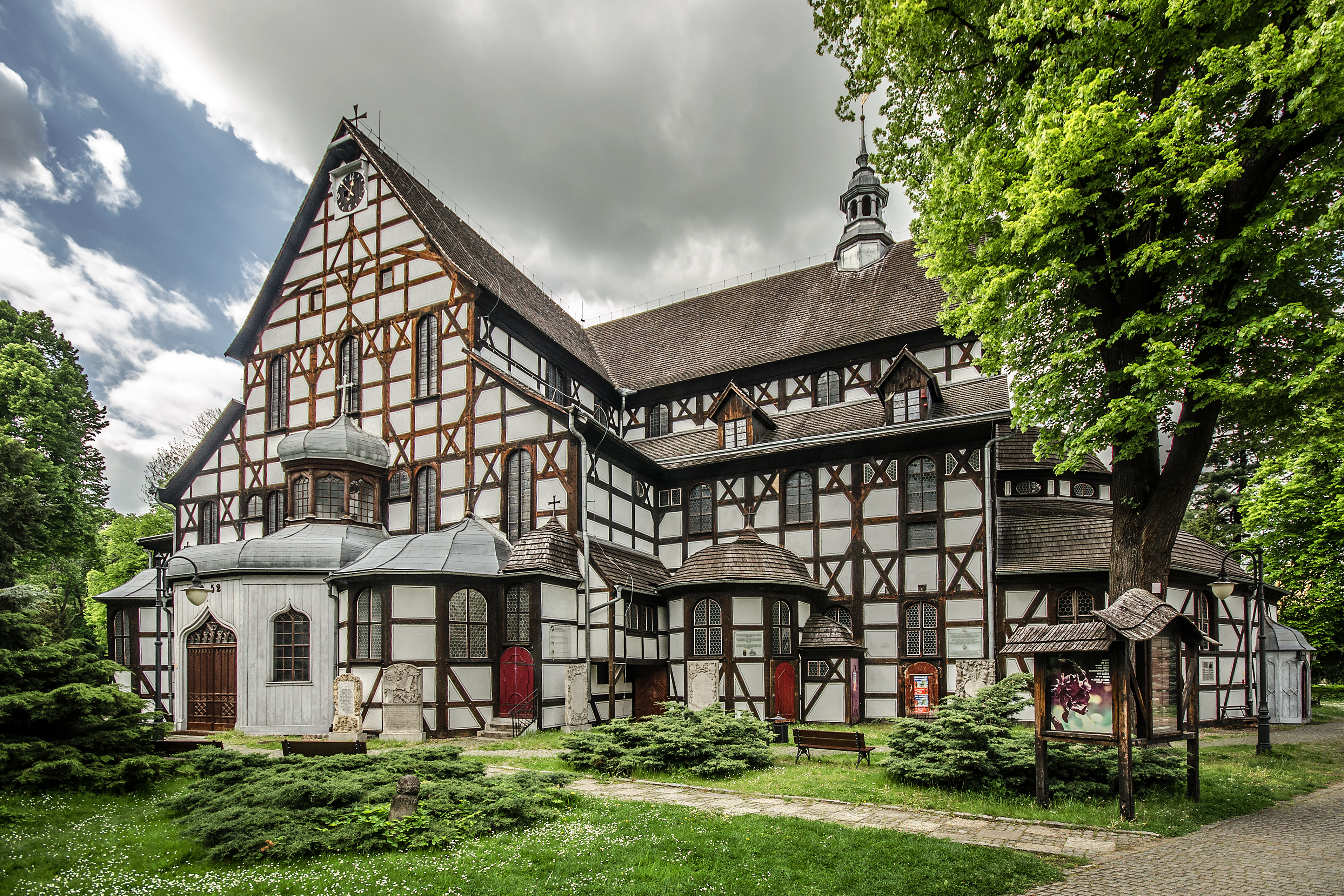 Świdnica, kościół ewangelicki (Pokoju), poł. XVII, XVIII